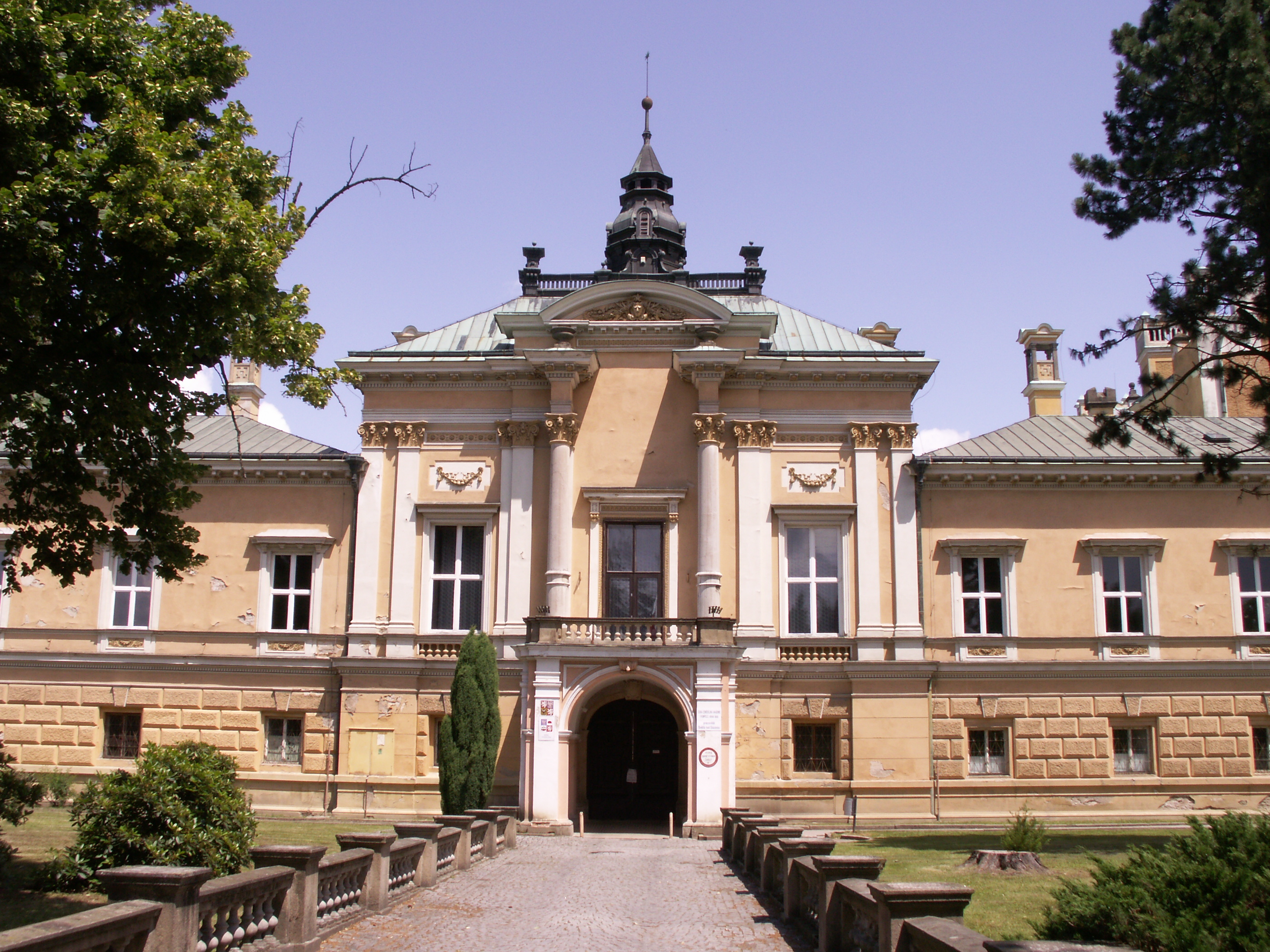 patrová, převážně novorenesanční budova o čtyřech křídlech, hlavní vchod uprostřed západního traktu